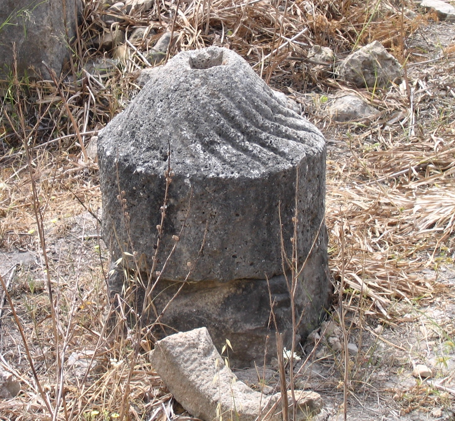 Meule à olive de Volubilis (Maroc). Premier plan : morceau d'anneau broyeur (meule tournante). Second plan : meule dormante présentant des stries caractéristiques des meules à olives